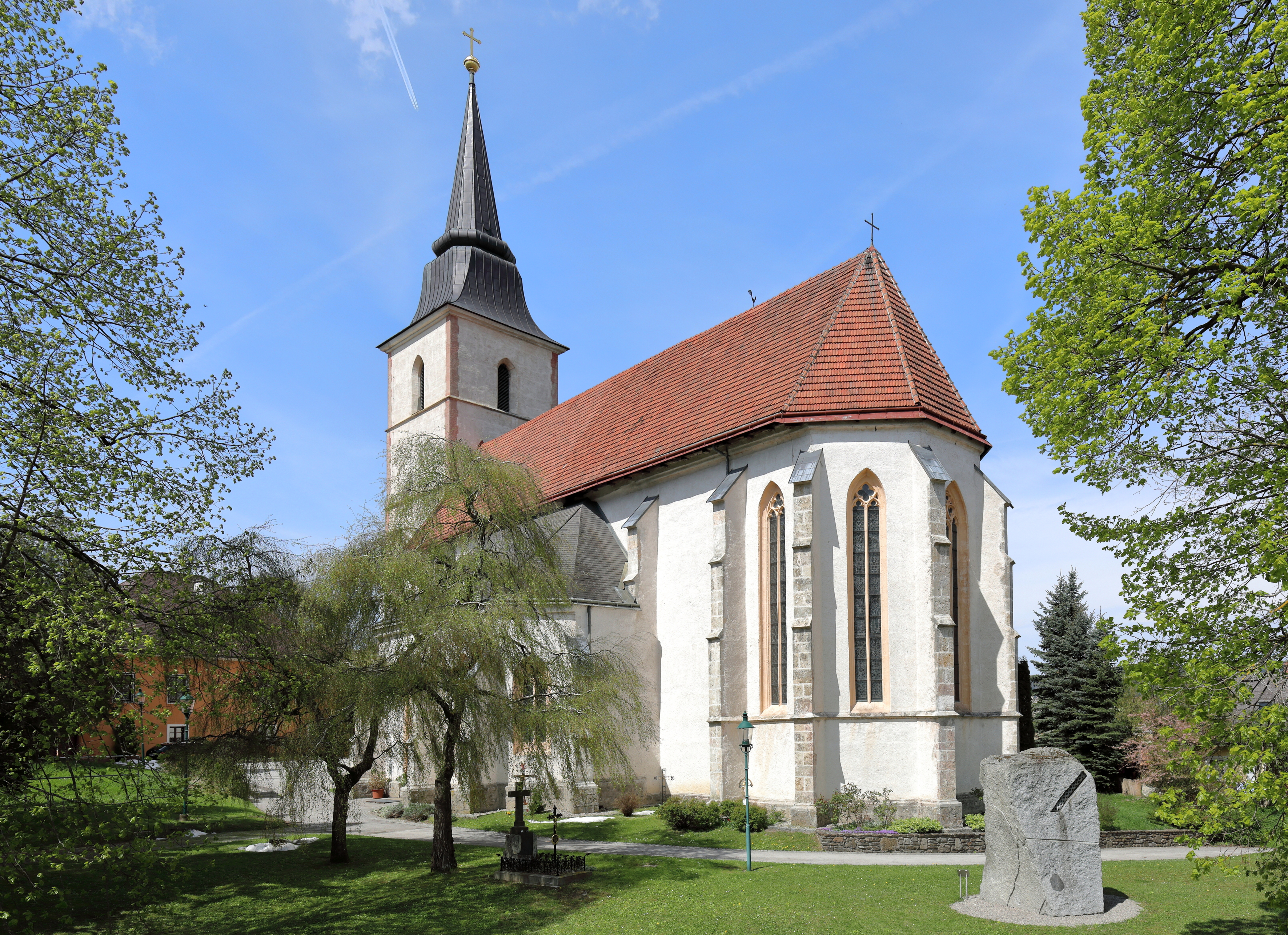 Die röm.-kath. Pfarrkirche hl. Andreas in der niederösterreichischen Stadt Hainfeld.Die zweischiffige (spät)gotische Kirche wurde vermutlich über einem älteren Vorgängerbau errichtet und hat eine südliche Seitenkapelle sowie einen wuchtigen Westturm. Vor der Kirche ein bearbeiteter Steinblock von dem Bildhauer Gottfried Höllwarth (Andreaskreuz/Andreas-Stein, aufgestellt am 11. Sep. 2009).